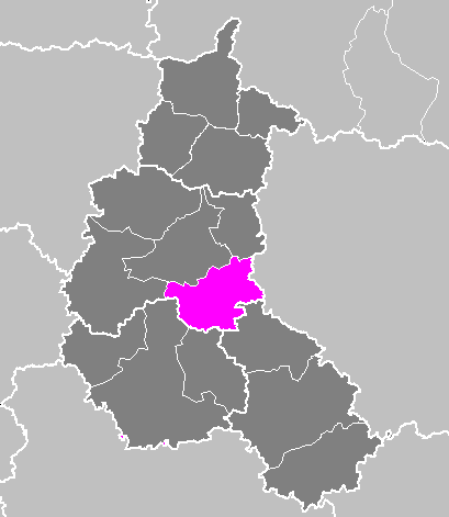 Maps of arrondissements and cantons of France: Arrondissement de Vitry-le-François.PNG